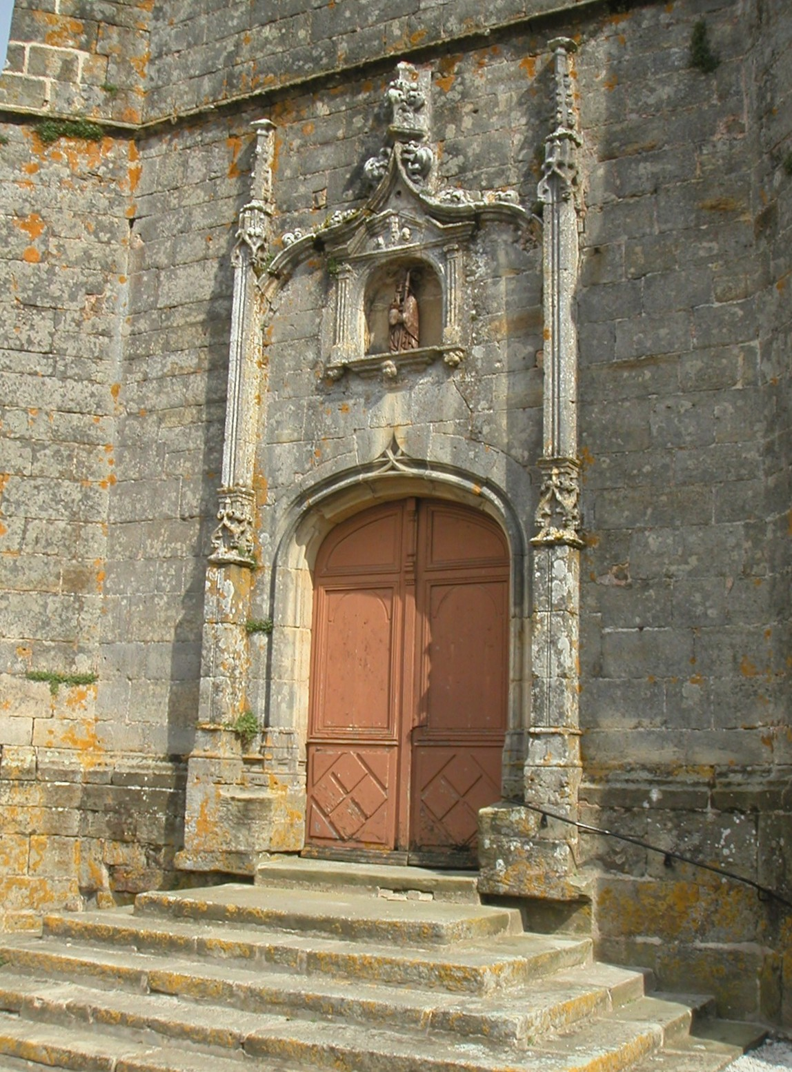 Entrée de l'église de Poinson-lès-Fayl